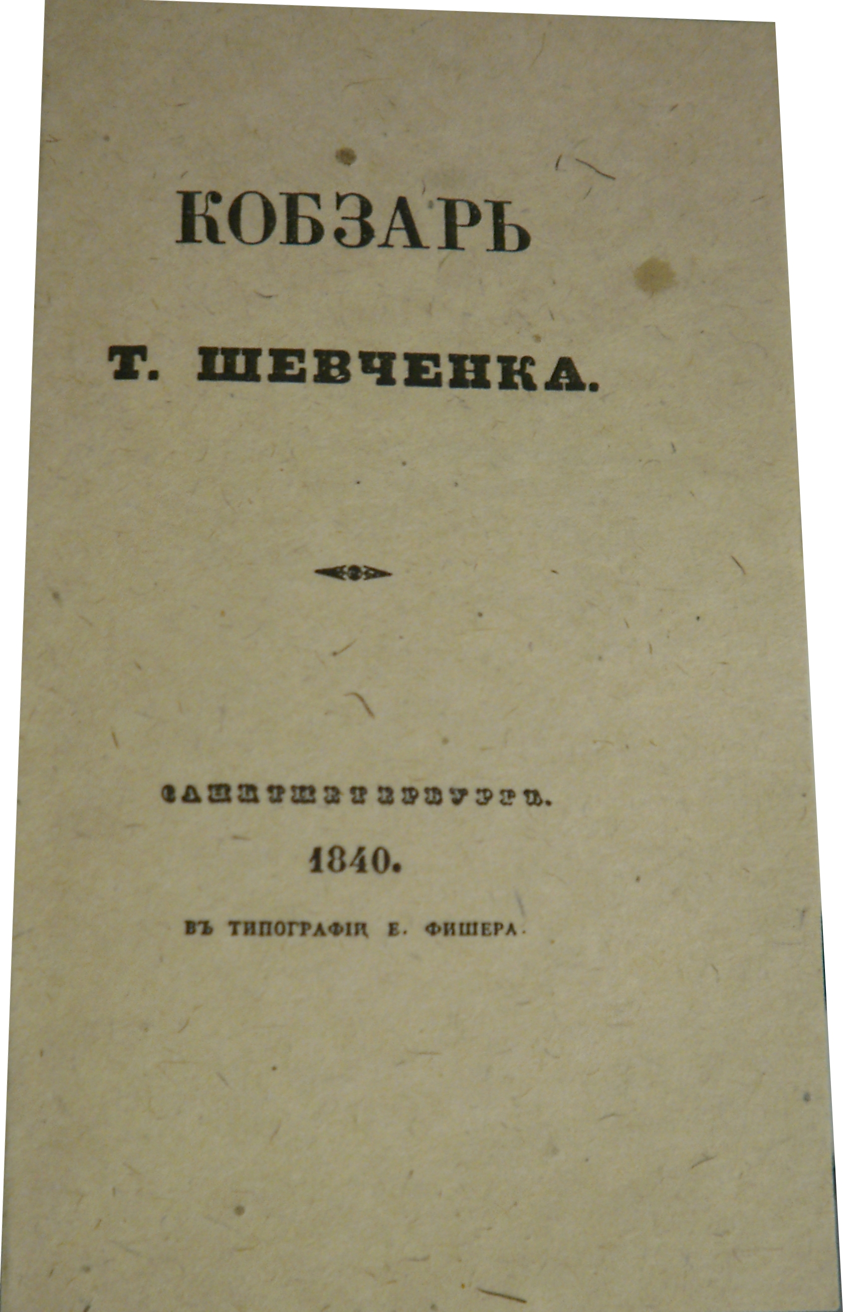 фото обкладинки ротапринтного перевидання Кобзаря 2016 року